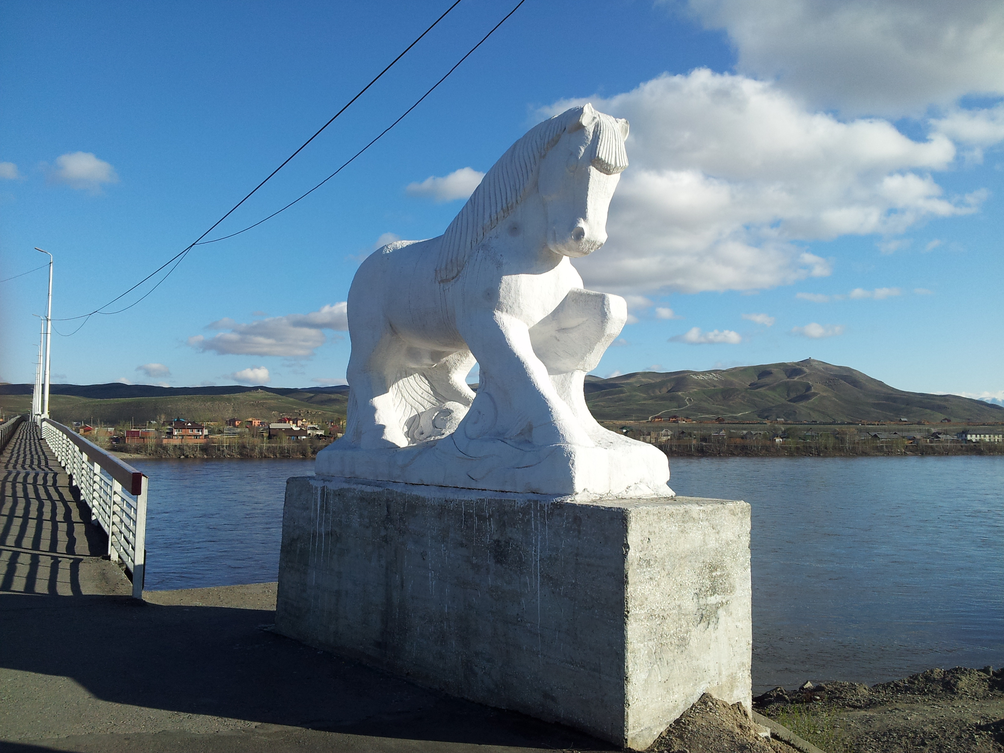 Тыва дыл: х.Кызыл. Эне-Сай (Енисей) кежир көвүрүгде аът тураскаалы